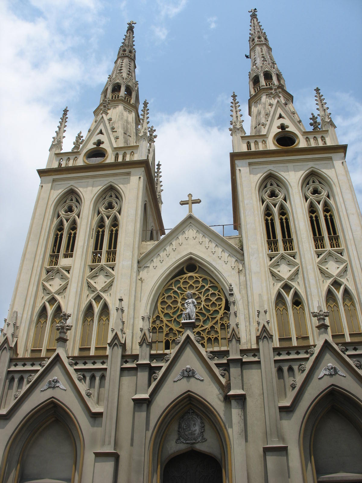 Iglesia de san Roque, Barranquilla